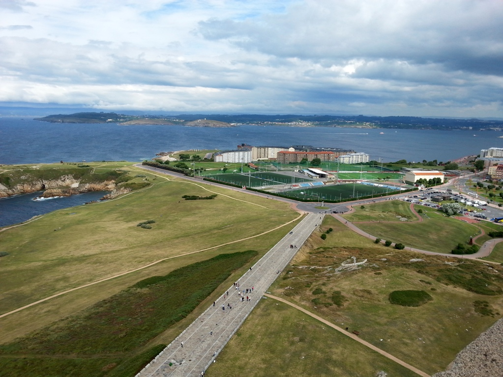 Vista dende Torre de Hércules na que se observa o camiño de acceso á propia torre, a Cidade Deportiva da Torre, o barrio de Dormideiras e a ría da Coruña.